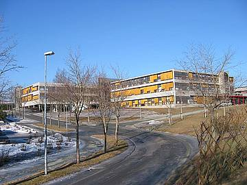 Marinteknisk senter på NTNU Tyholt